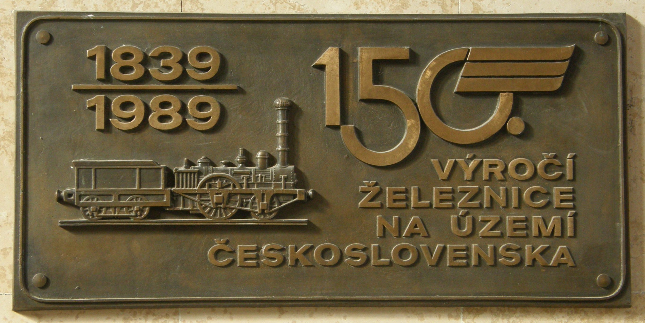 Pamatní deska k 150. výročí železnice na území Československa na brněnském hlavním nádraží